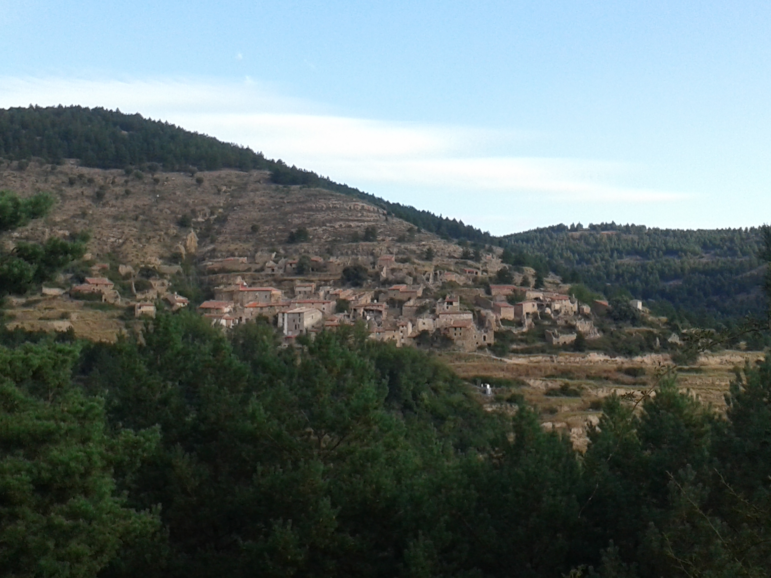 Vista del pueblo soriano de Armejún desde un camino con dirección a Villarejo.